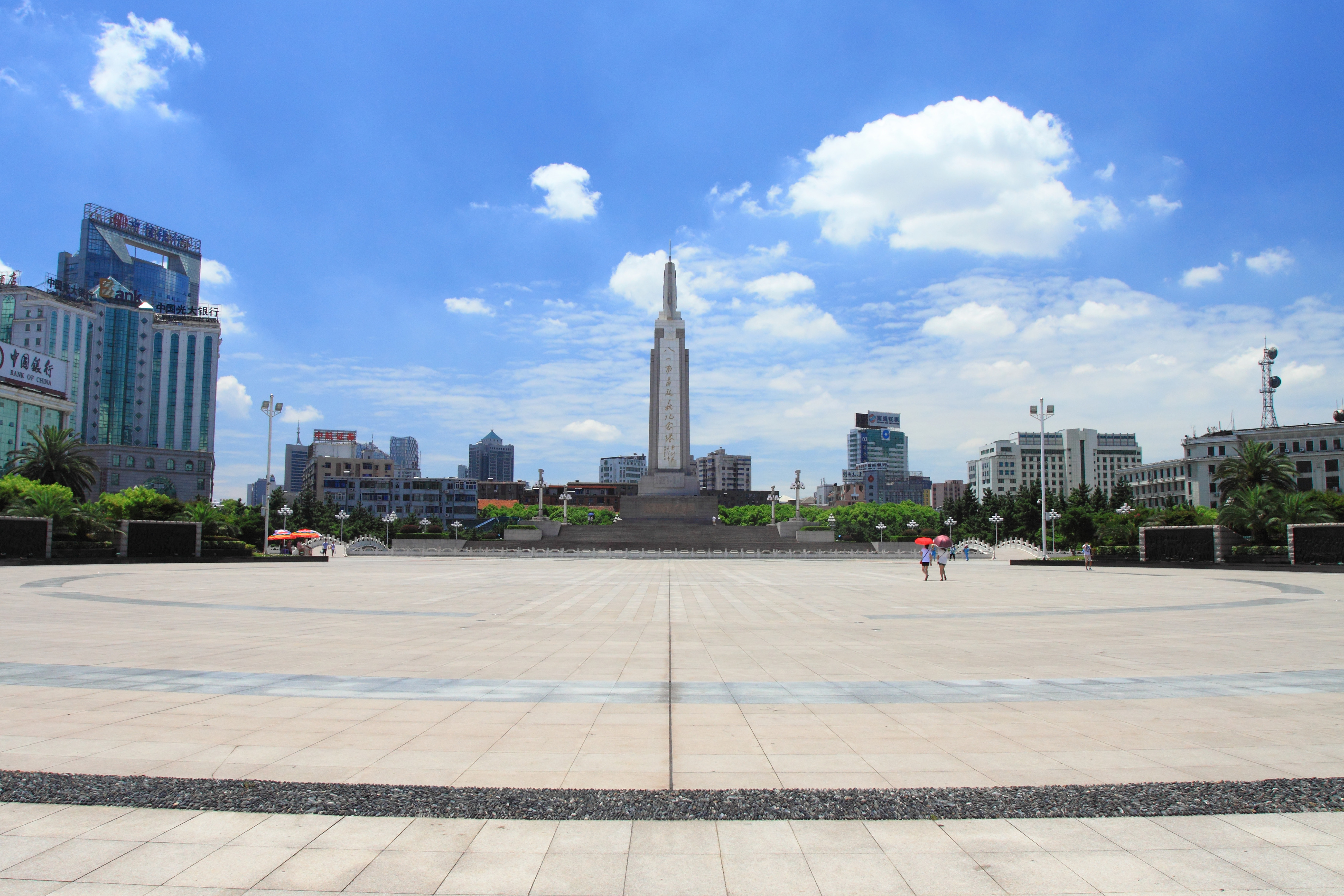 八一广场八一南昌起义纪念塔，位于中国江西省南昌市。